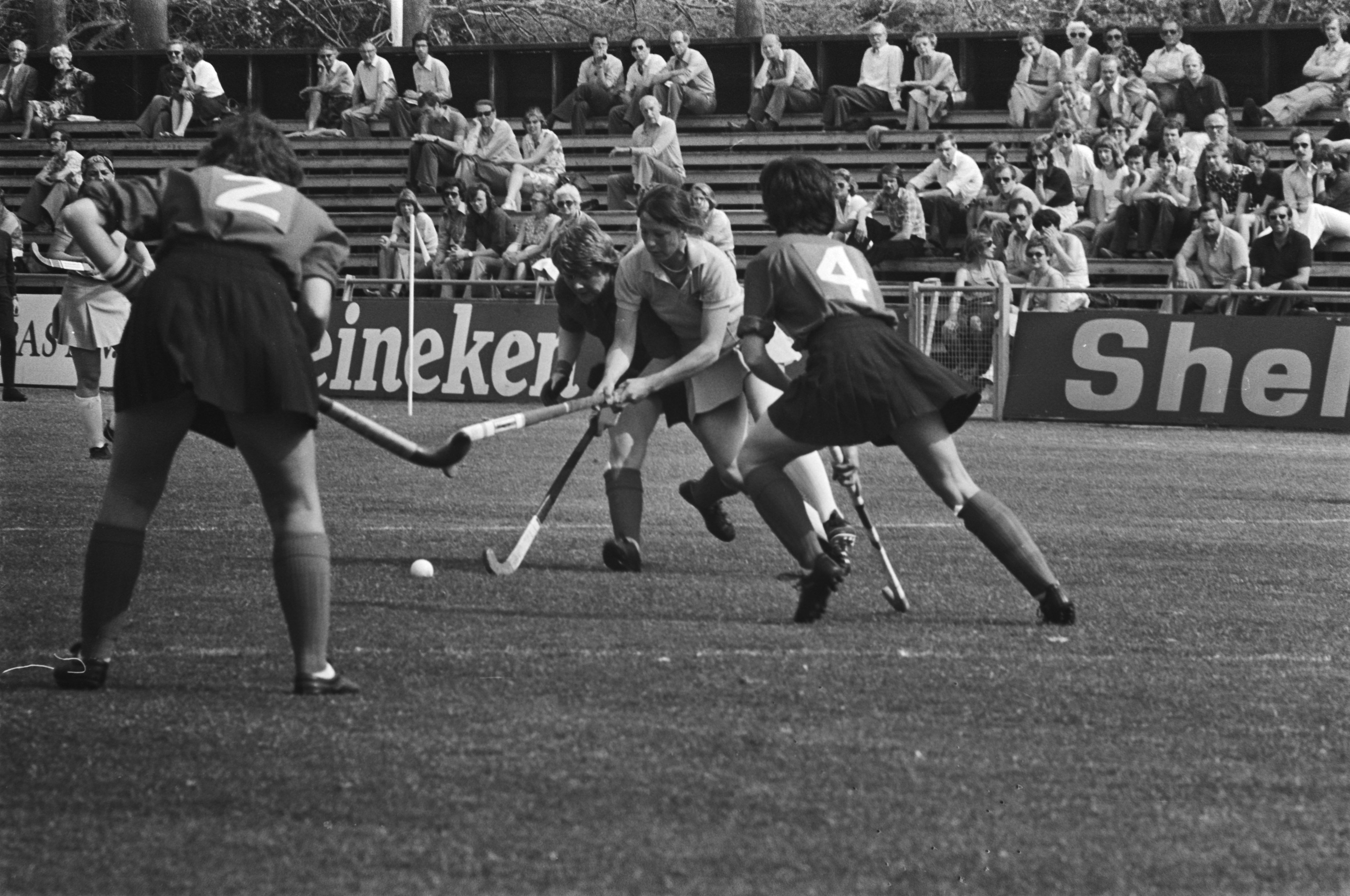 Collectie / Archief : Fotocollectie Anefo Reportage / Serie : [ onbekend ] Beschrijving : Dameshockeyinterland Nederland tegen Wales, spelmomenten Datum : 8 mei 1976 Trefwoorden : hockey, sport Fotograaf : Croes, Rob C. / Anefo Auteursrechthebbende : Nationaal Archief Materiaalsoort : Negatief (zwart/wit) Nummer archiefinventaris : bekijk toegang 2.24.01.05 Bestanddeelnummer : 928-5652